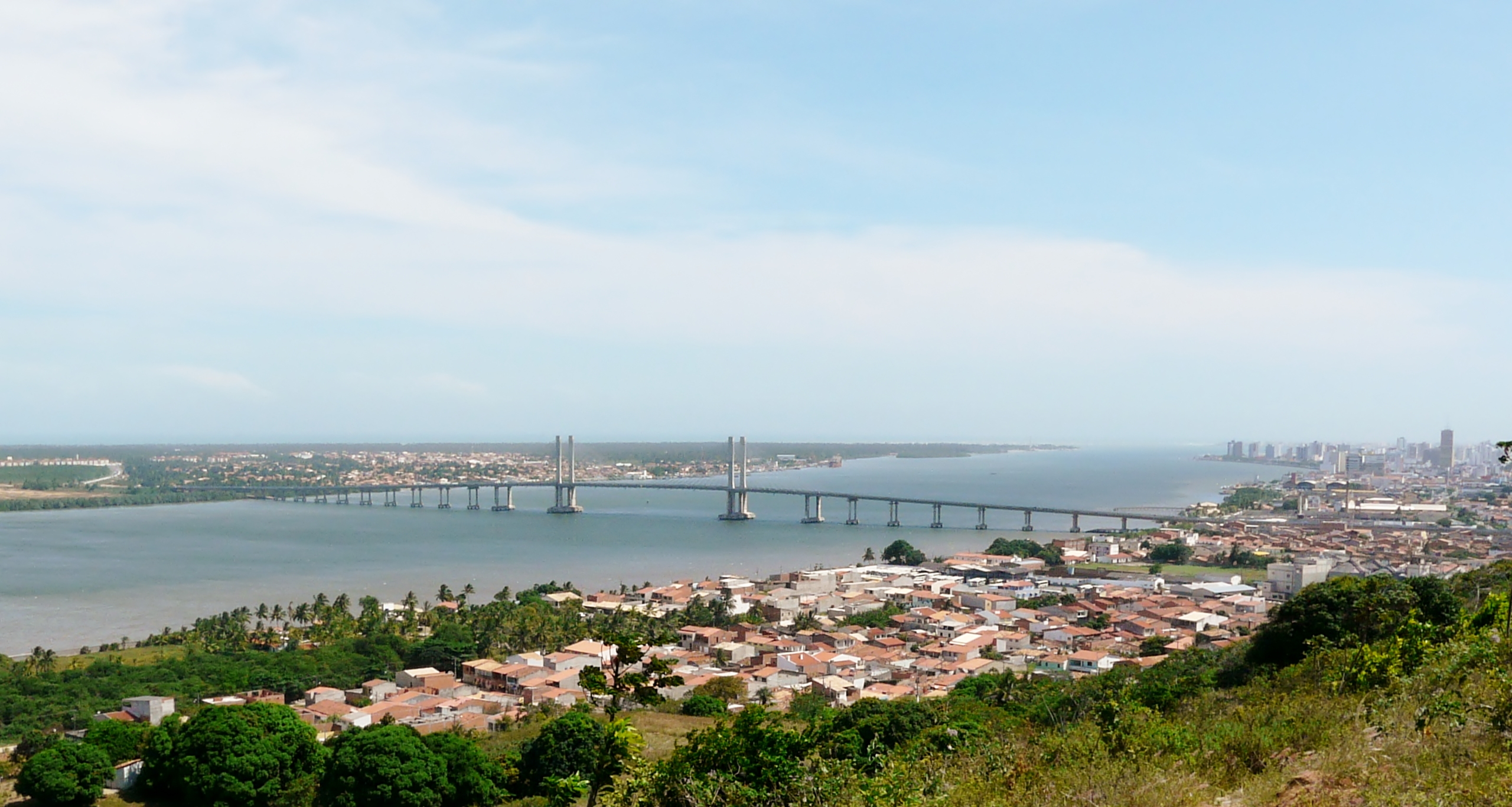 Vista da Ponte Aracaju-Barra (Ponte Construtor João Alves) sobre o rio Sergipe.